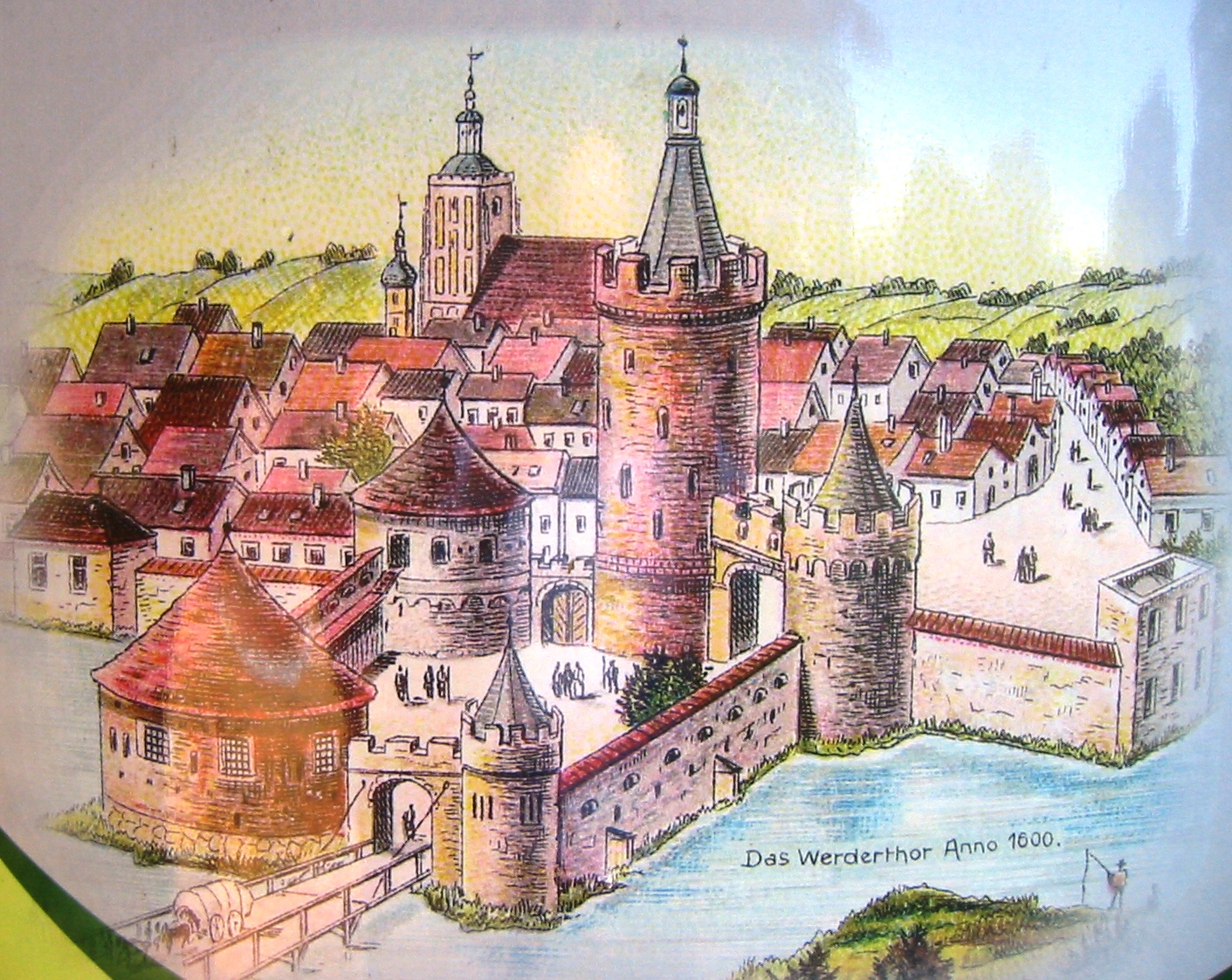 Gubin - Brama Ostrowska w zespole murów miejskich, XV/XIV (z pierwotnej bramy do czasów współczesnych zachowała się jedynie Baszta Ostrowska)